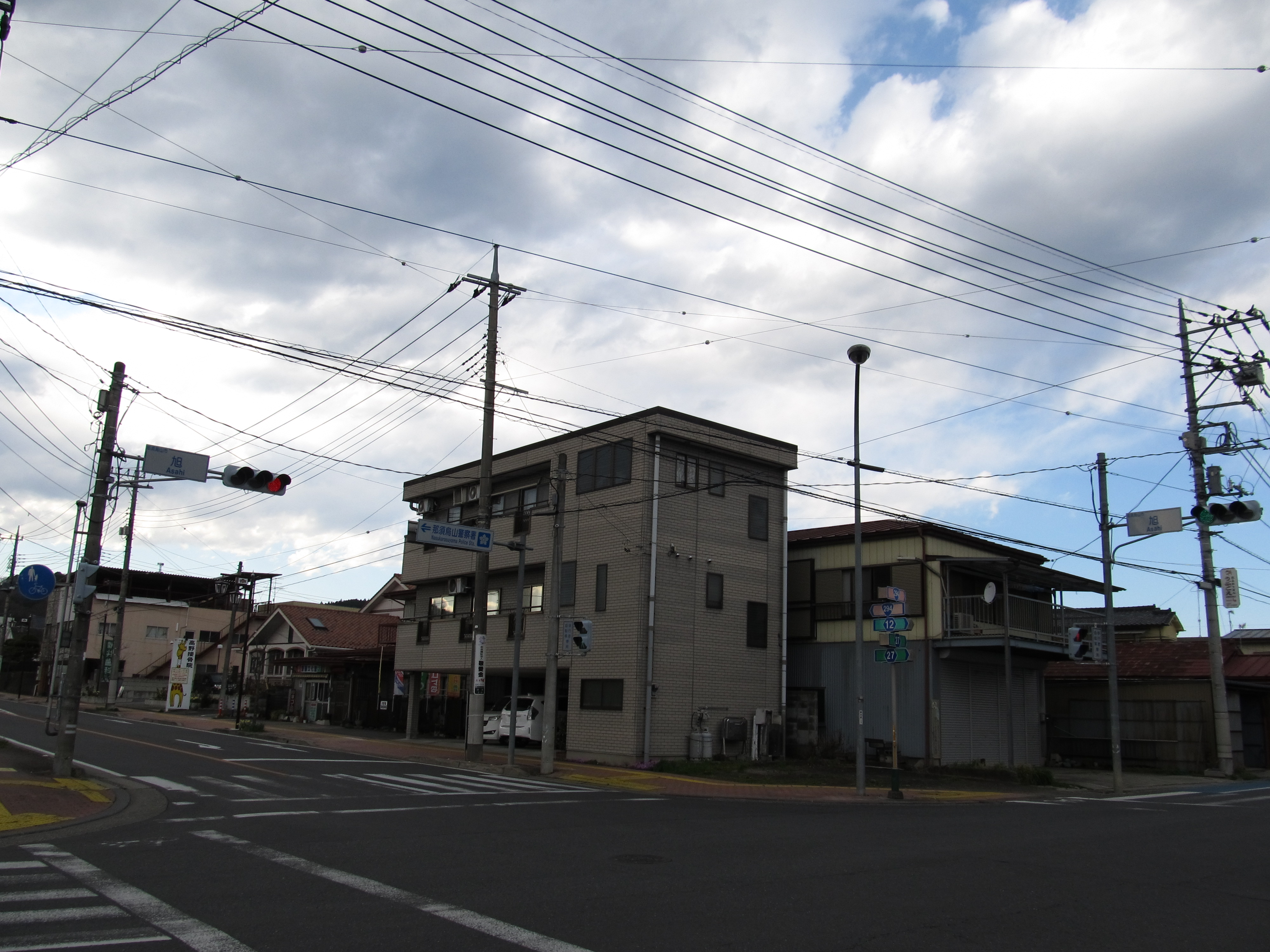 栃木県那須烏山市にある国道294号の旭交差点。栃木県道・茨城県道12号の起点である。